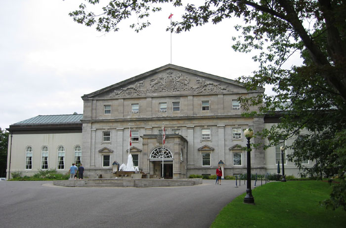 Rideau Hall, Canada's governor general's residence